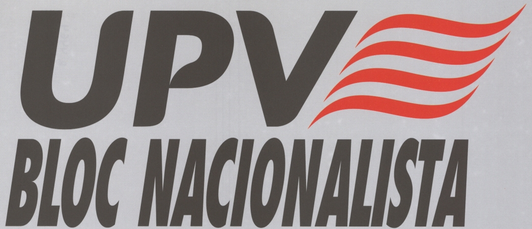 Logotip de la UPV de mitjans els 90, quan la coalició "Bloc Nacionalista"